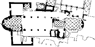 Базилика св. Вита, Вацлава и Войтеха